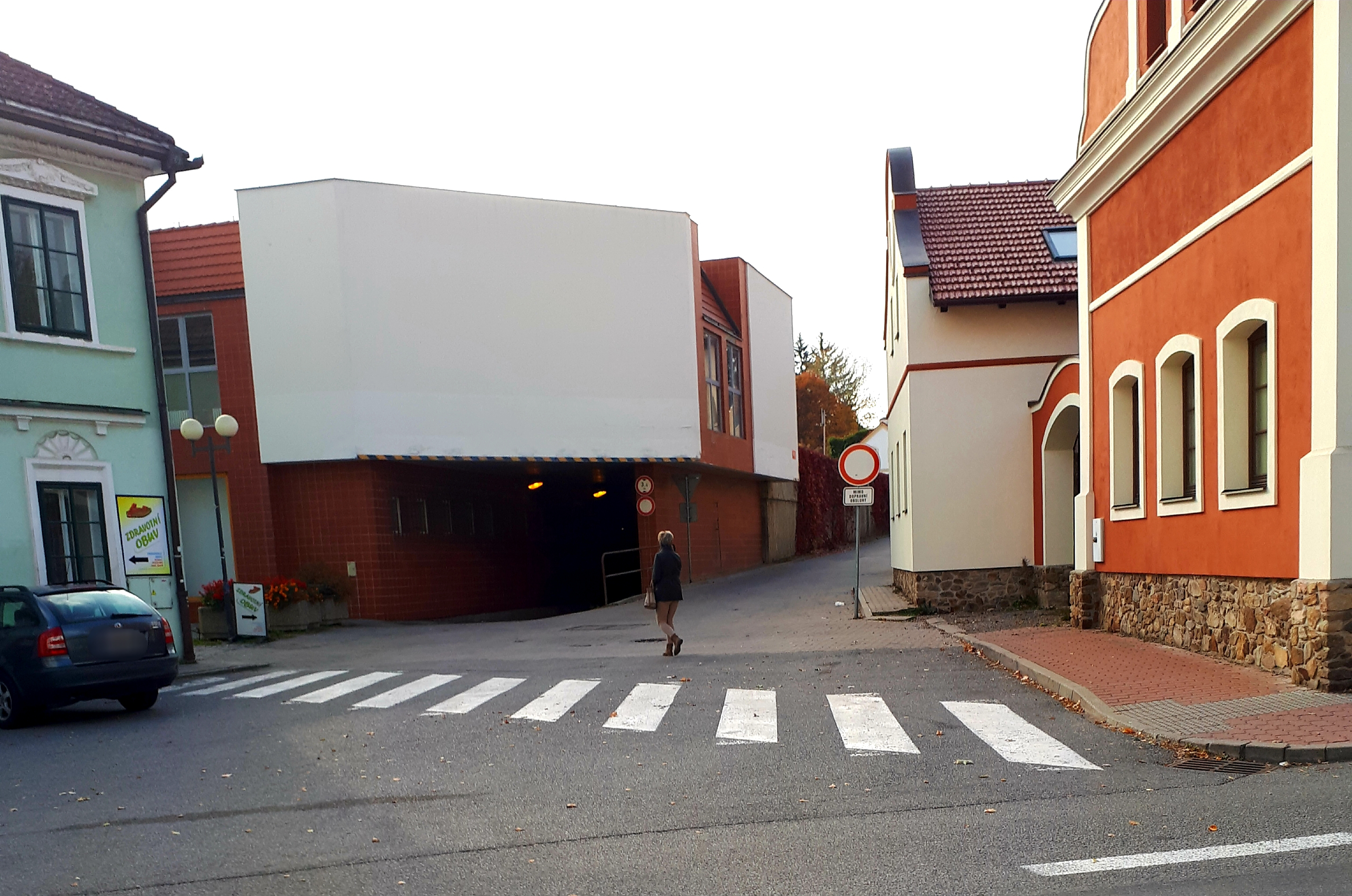 Obchodní dům Vysočina, Pelhřimov, boční vjezd z historické Hrnčířské ulice